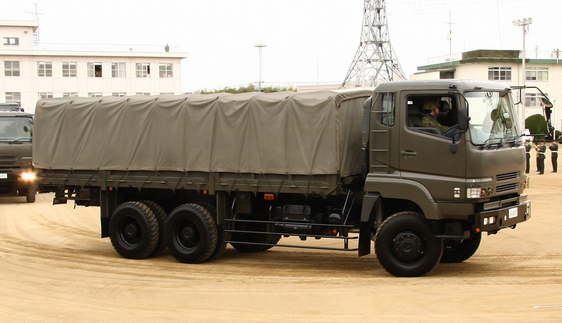 春日井駐屯地創立記念行事にて。